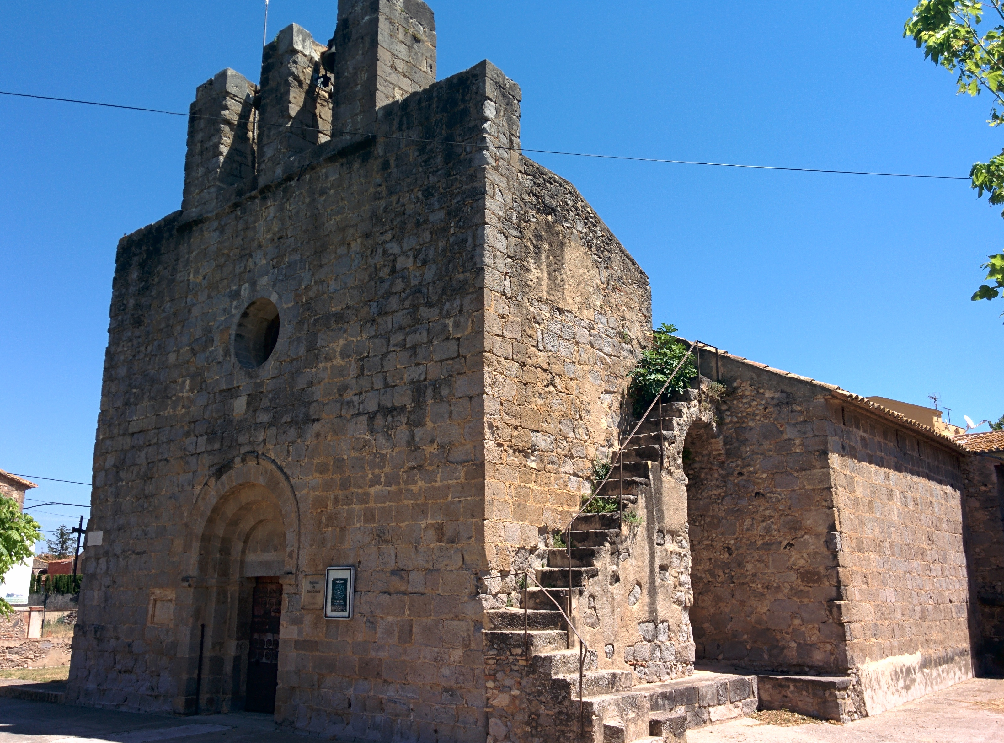 Església parroquial de Sant Cebrià (Torroella de Fluvià)